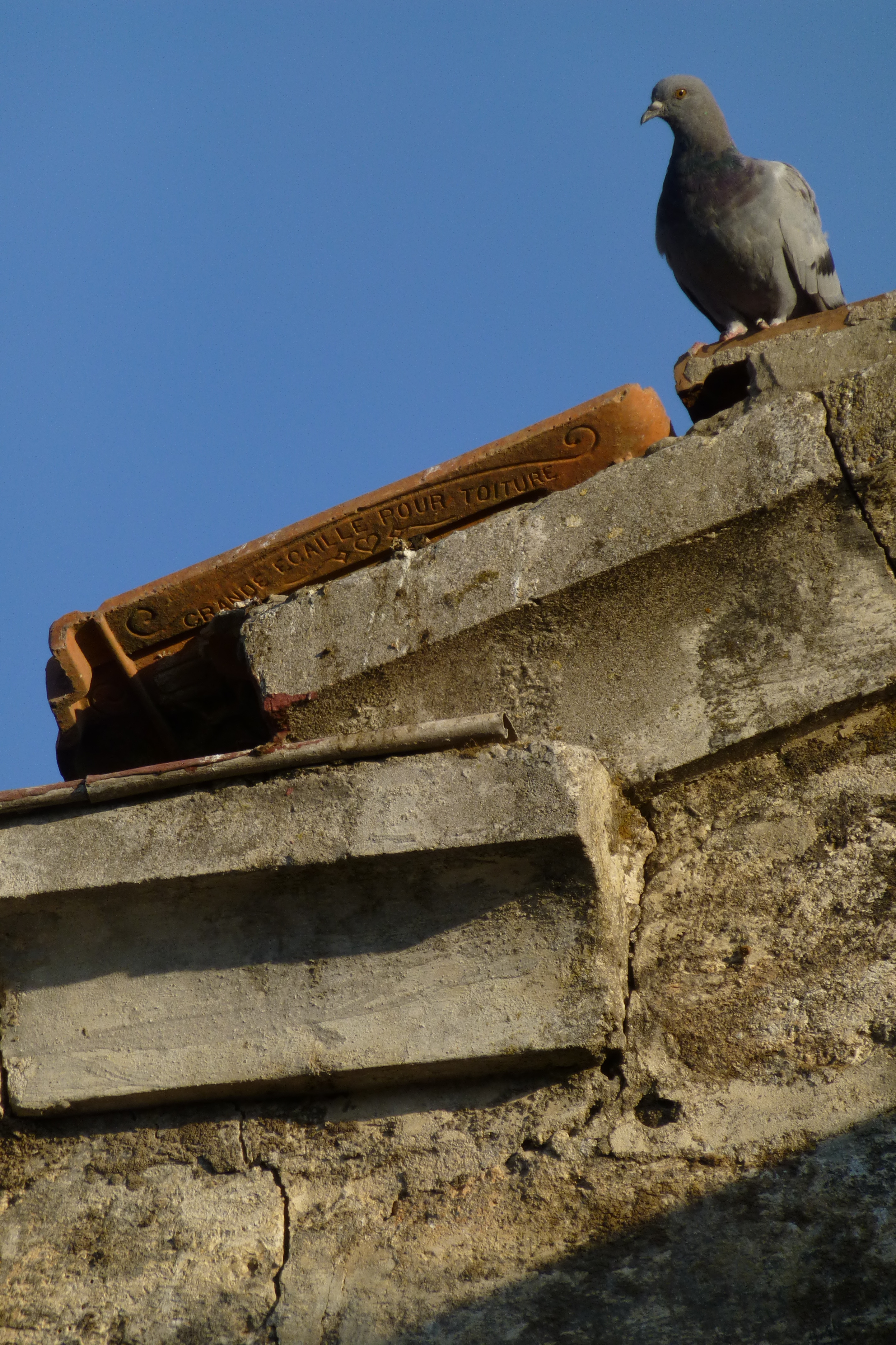 ראשוני המתיישבים באתר היישוב אלוני אבא היו בני הדור השני של תנועת הטמפלרים הגרמנים, אשר הקימו במקום בשנת 1907 מושבה חקלאית קטנה ושמה "ולדהיים".